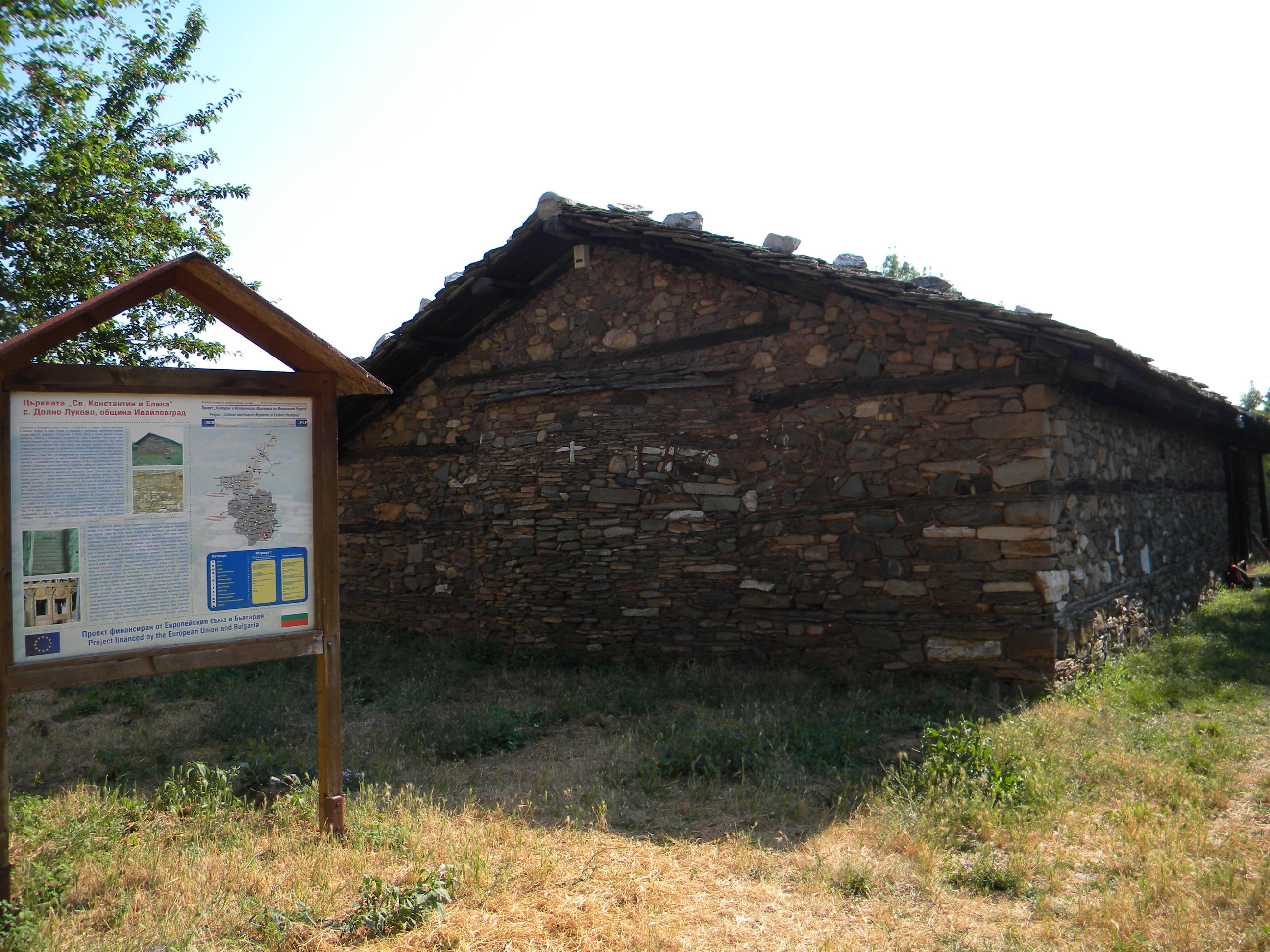 Църквата Свети Константин и Елена